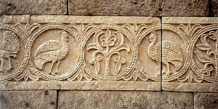 date du cliché : octobre 2001